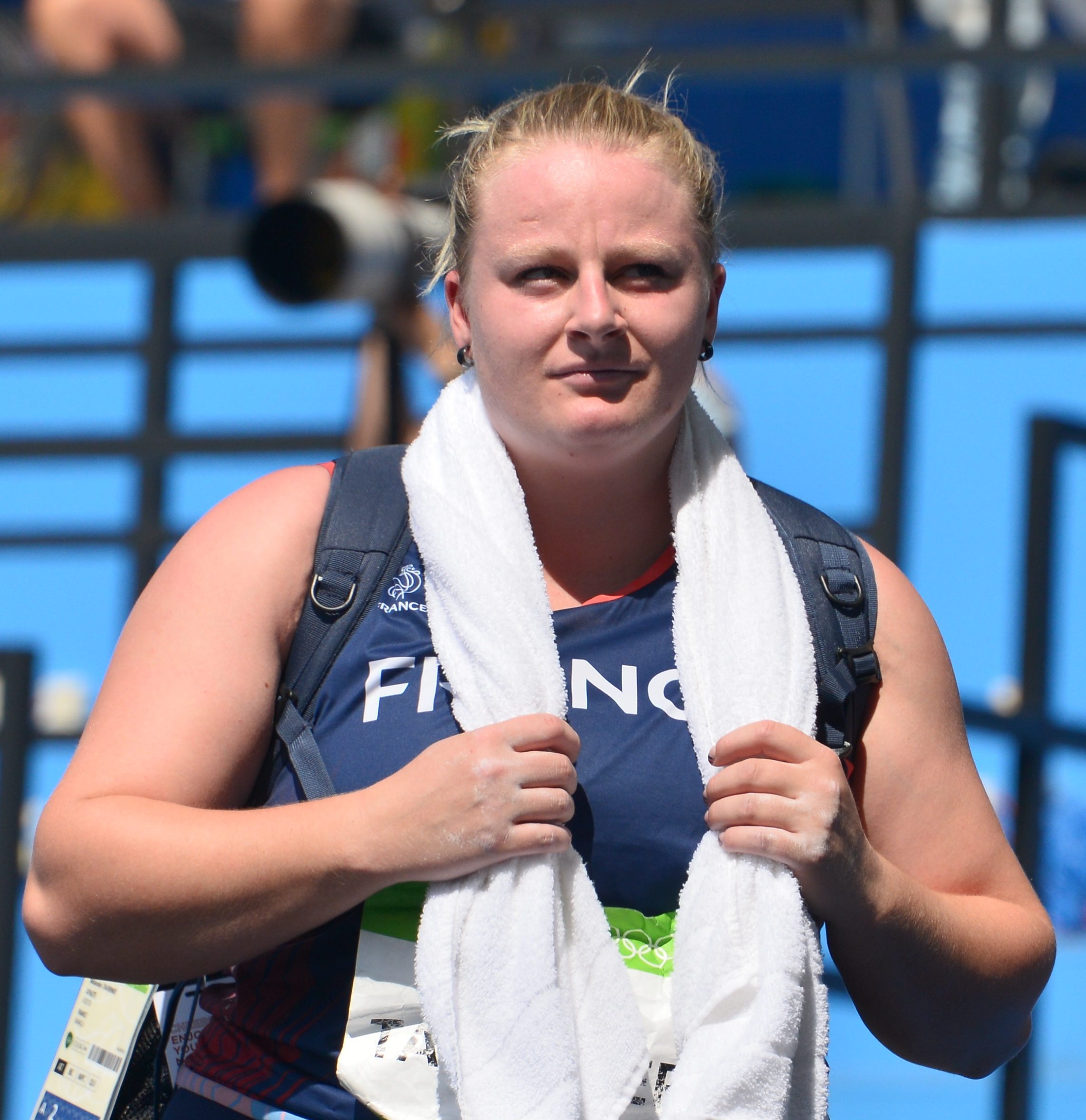 Alexandra Tavernier juste après la finale du lancer du marteau aux JO de Rio 2016